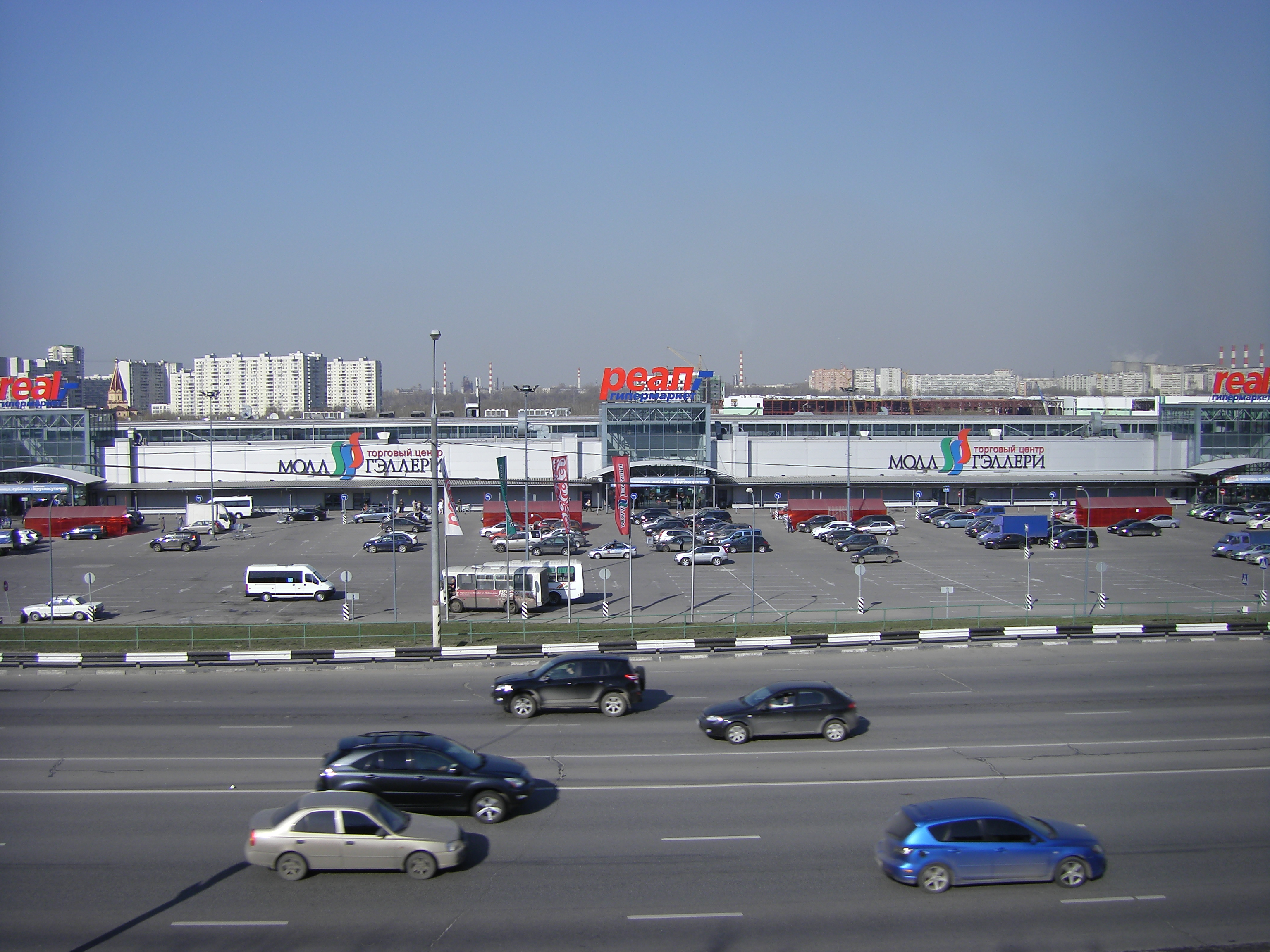 Бывший гипермаркет «Real» в Москве в районе Братеево, вид с Бесединского шоссе (бывшего проектируемого проезда № 5396) с возвышенности